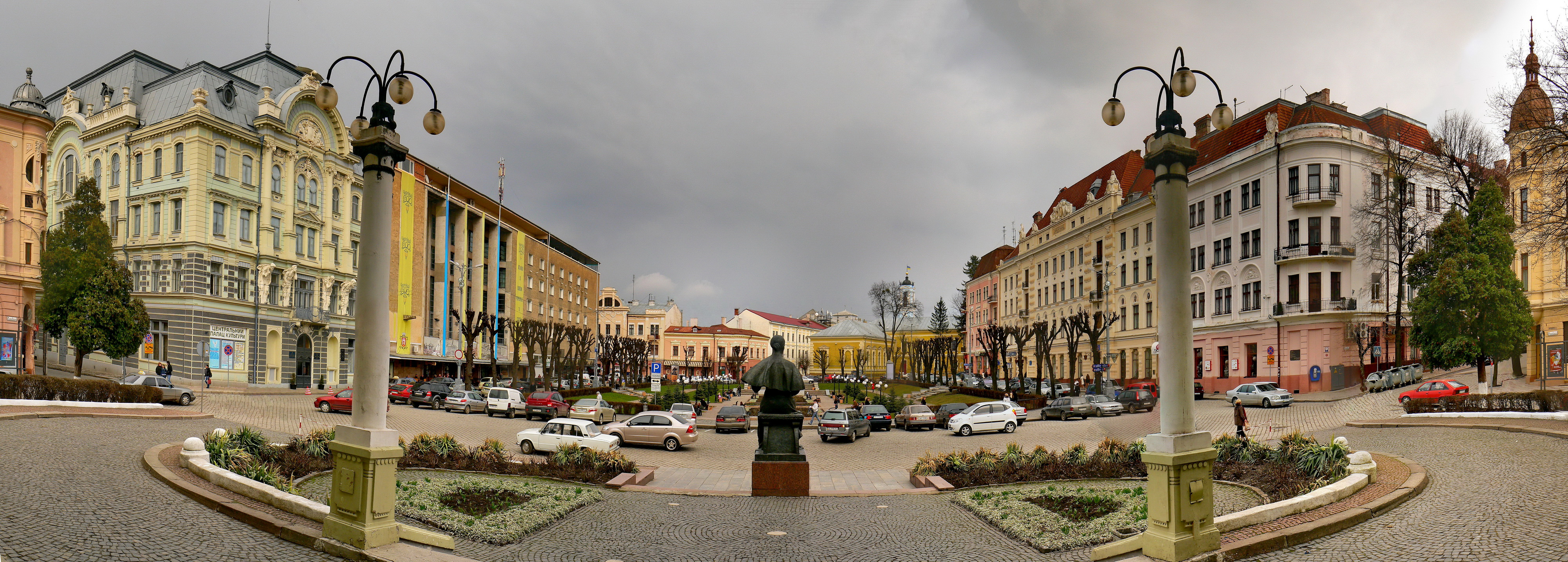 Архітектурний ансамбль Театральної площі